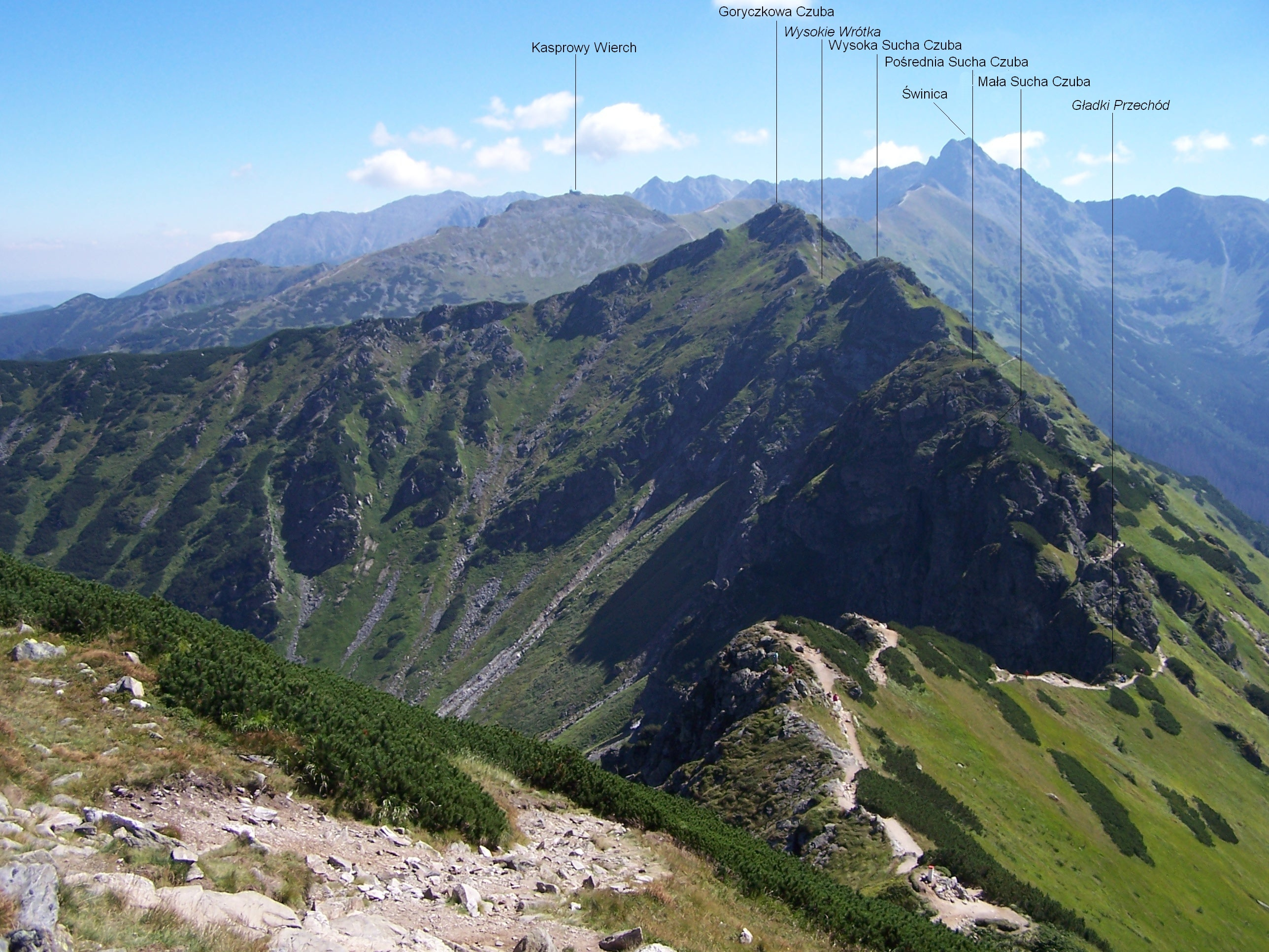 Widok ze szlaku turystycznego przez Suchy Wierch Kondracki